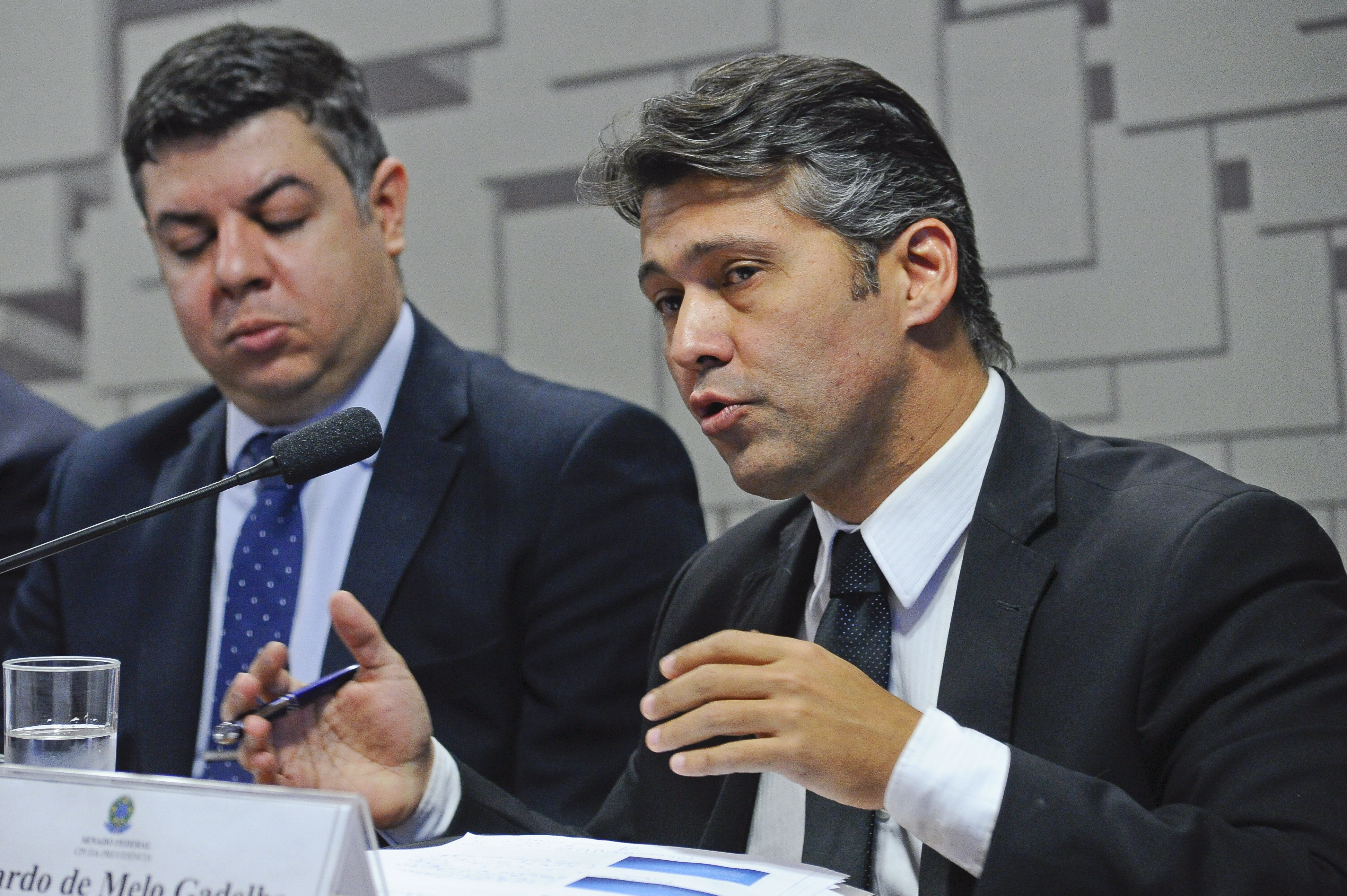 CPI da Previdência (CPIPREV) realiza audiência pública com a participação de representantes da Receita Federal, da Secretaria da Previdência, do Instituto Nacional de Seguro Social (INSS) e da Superintendência de Previdência Complementar (Previc). Mesa: diretor-superintendente da Superintendência Nacional de Previdência Complementar (Previc), Fábio Henrique de Sousa Coelho; presidente do Instituto Nacional do Seguro Social (INSS), Leonardo de Melo Gadelha. Foto: Geraldo Magela/Agência Senado